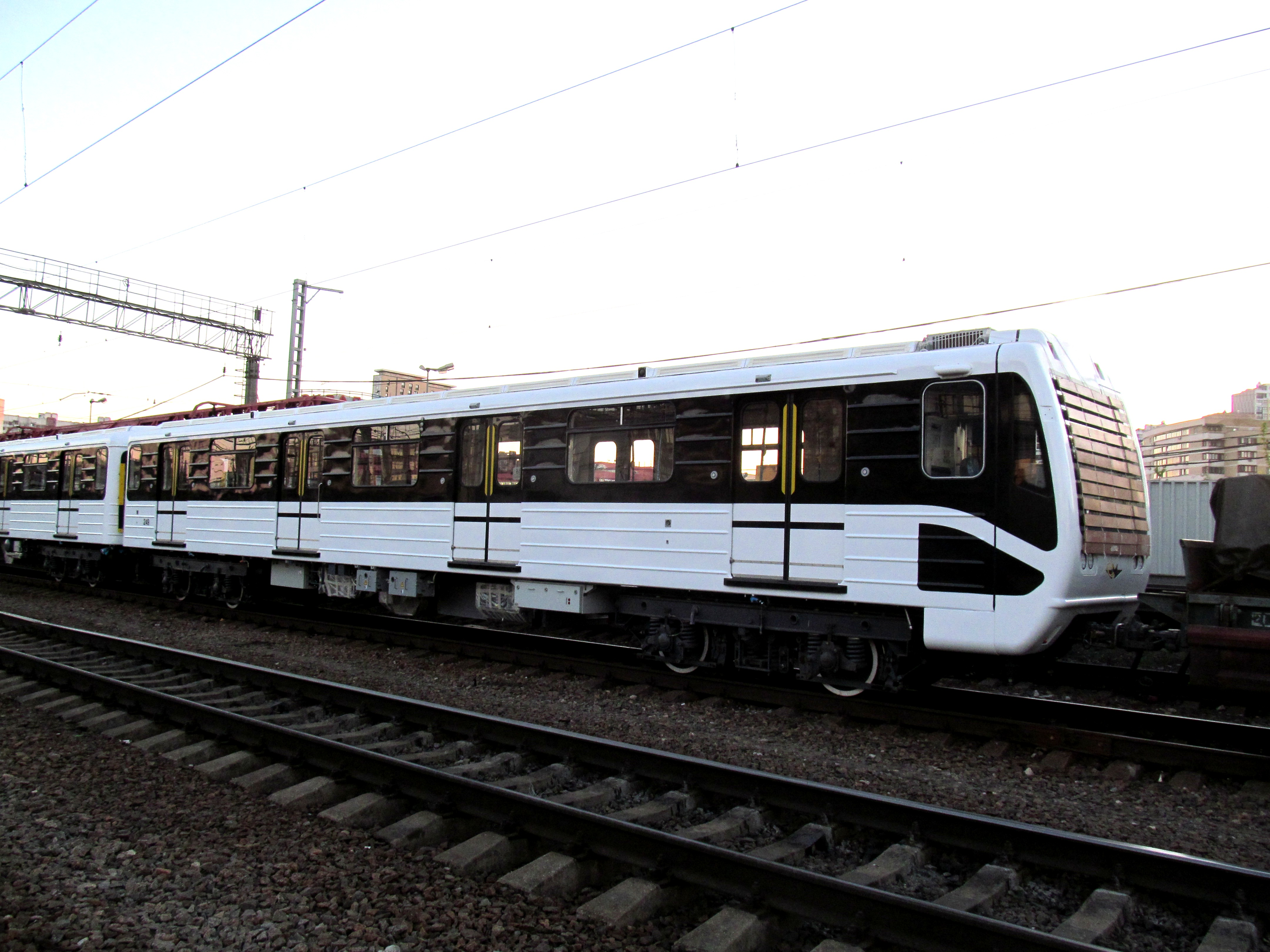 Метровагон 81-717.2К № 249 на станции Мытищи (подготовлен к отправке с завода)